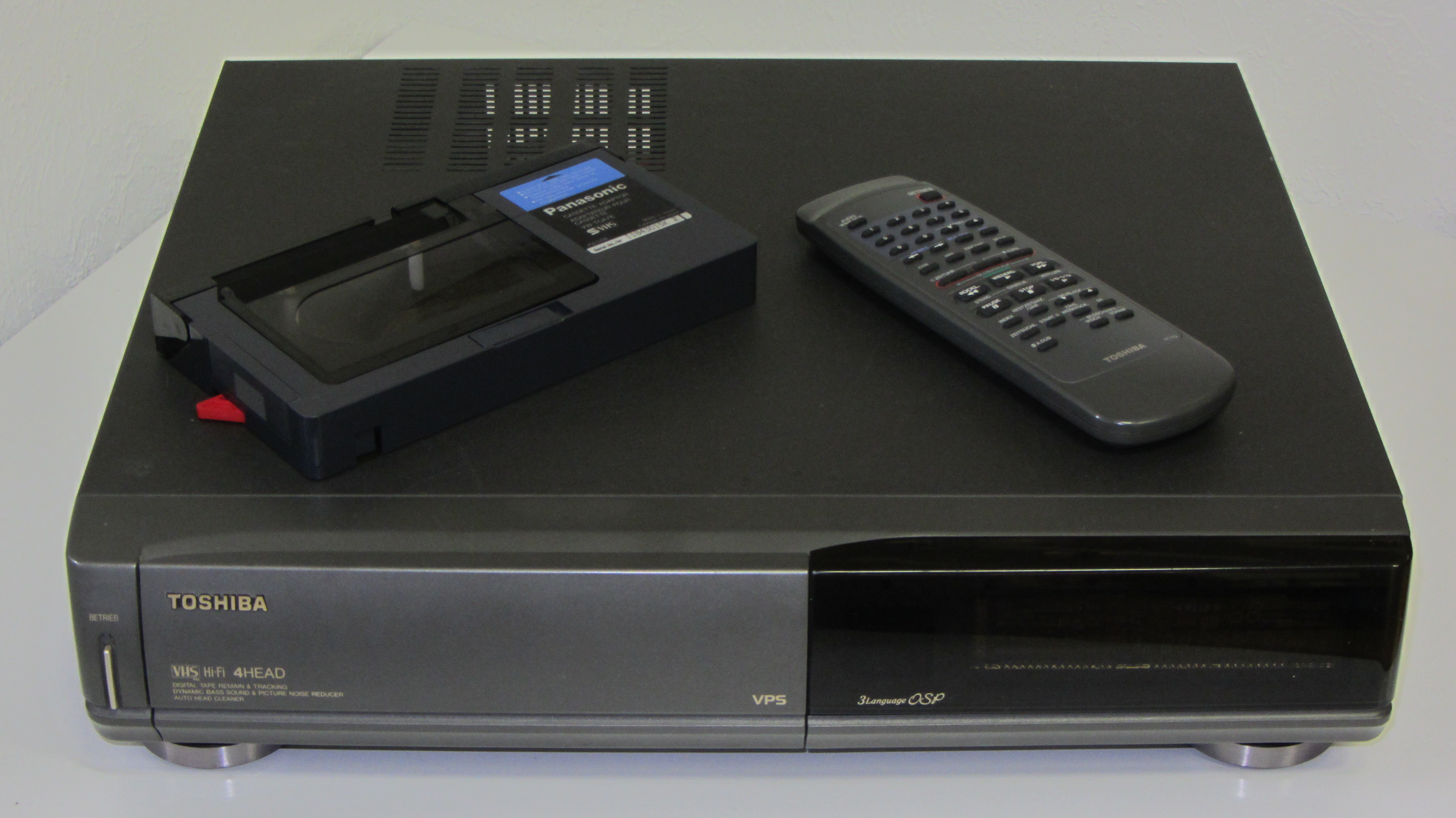 Toshiba VHS cassetten recorder V-711G